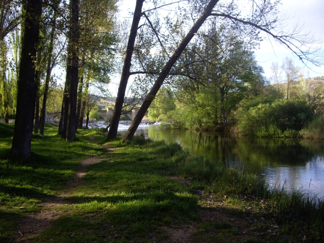 Fotografía tomada con una Pentax Optio A20 en El Sotoplaya el día 14 de mayo de 2012 a las 20h. un día soleado con temperatura agradable. Se observa la salida del ramal del molinete con el Puente de Piedra al fondo.